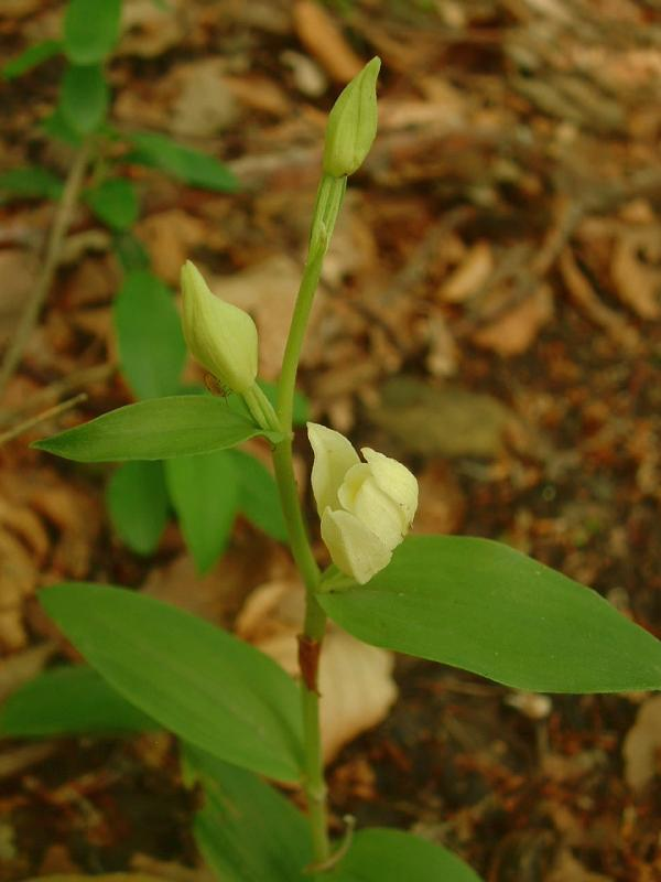 Cephalanthera damasonium, céphalanthère de Damas, Gy, mai 2004, licence GFDL